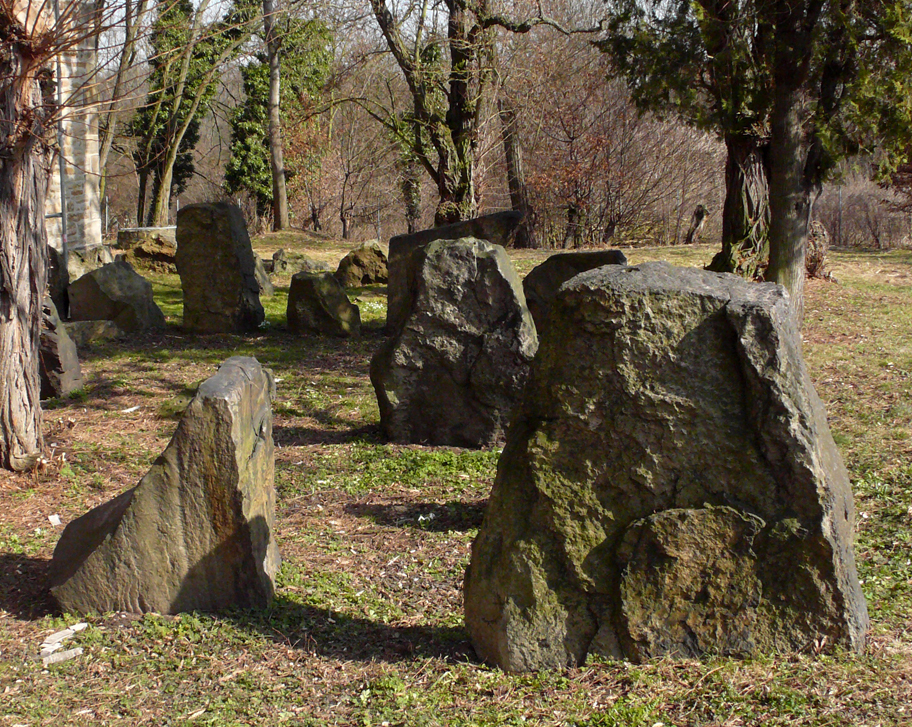 Treben (Wüstung), Slawische Grabsteine